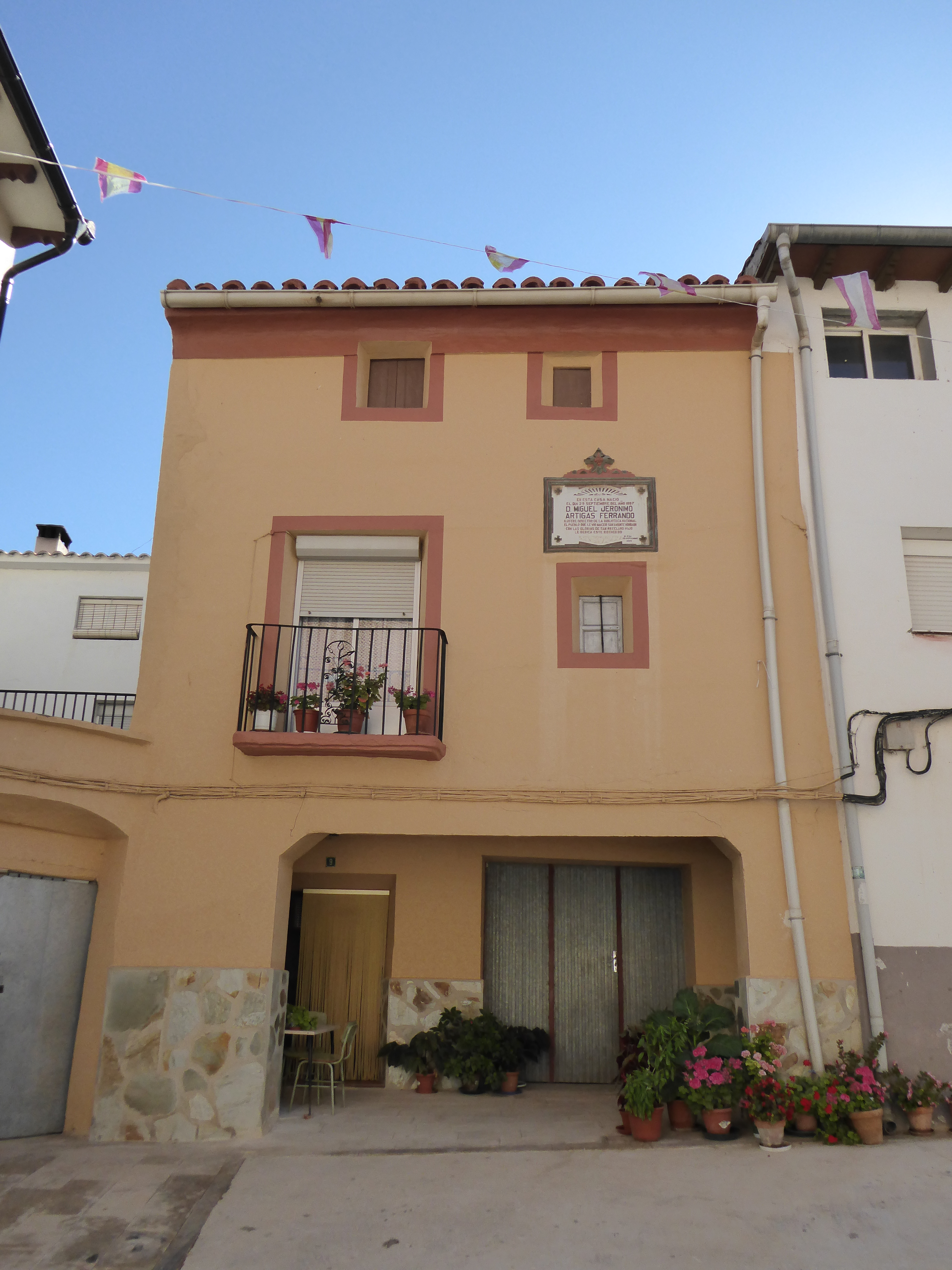 Blesa